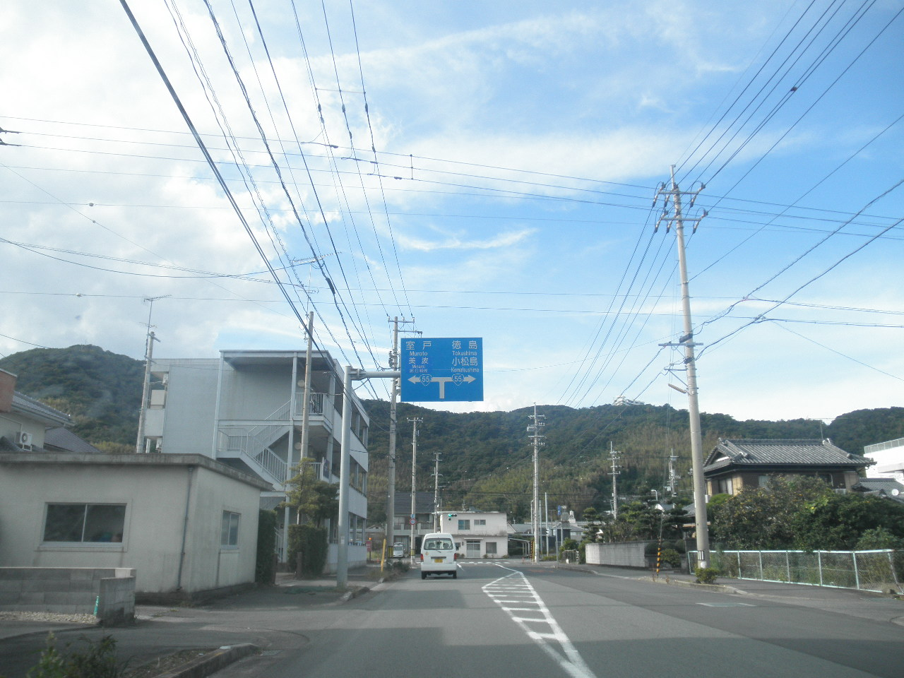 徳島県阿南市津乃峰町長浜 徳島県道285号戎山中林富岡港線